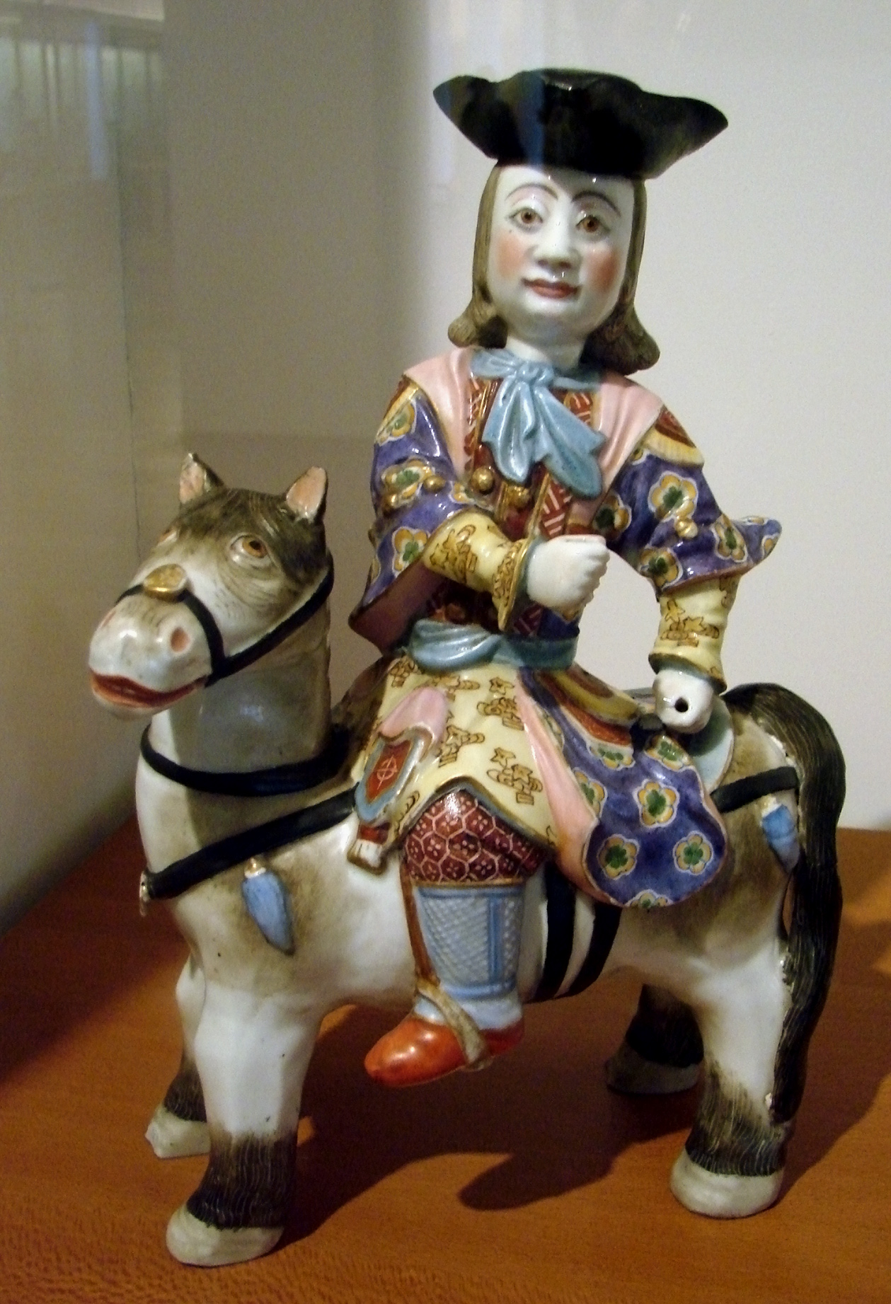 Cavalier européen, émaux sur couverte, dynastie Qing, 1ère moitié du 18ème siècle. Porcelaine chinoise destinée à l'exportation. Musée Guimet, Paris.